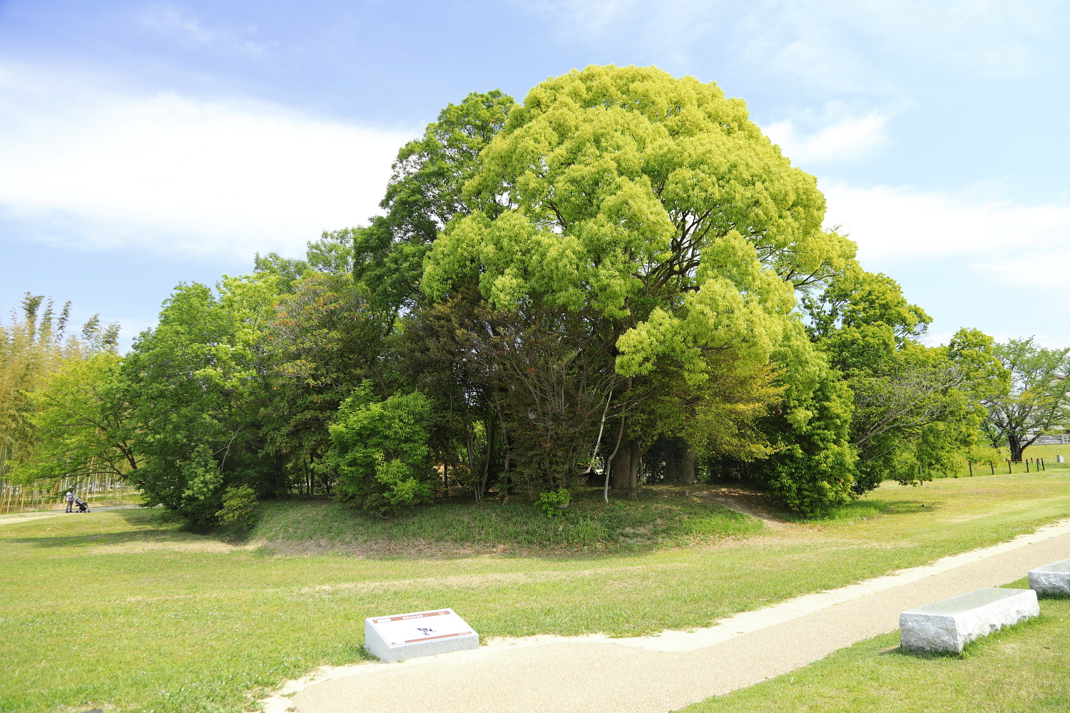 東大久手古墳（名古屋市守山区上志段味、2019年（令和元年）5月）